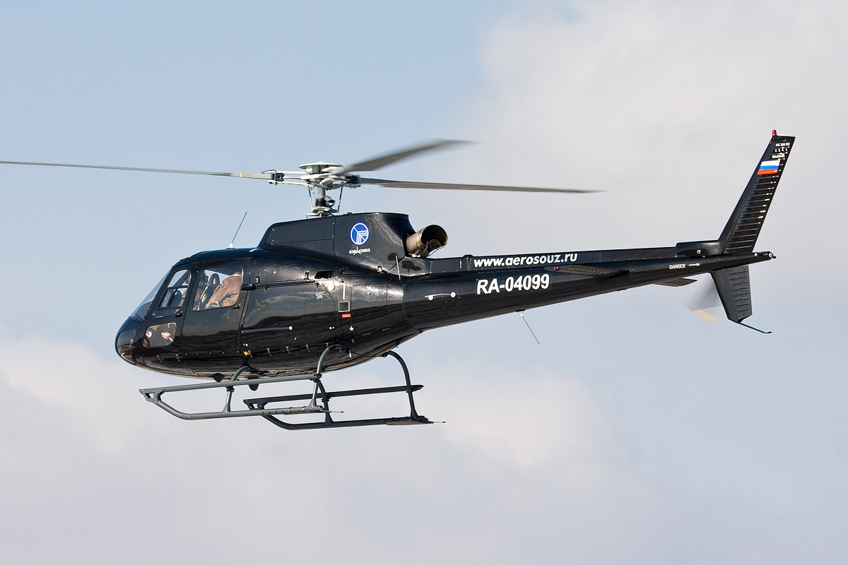 Eurocopter AS-350